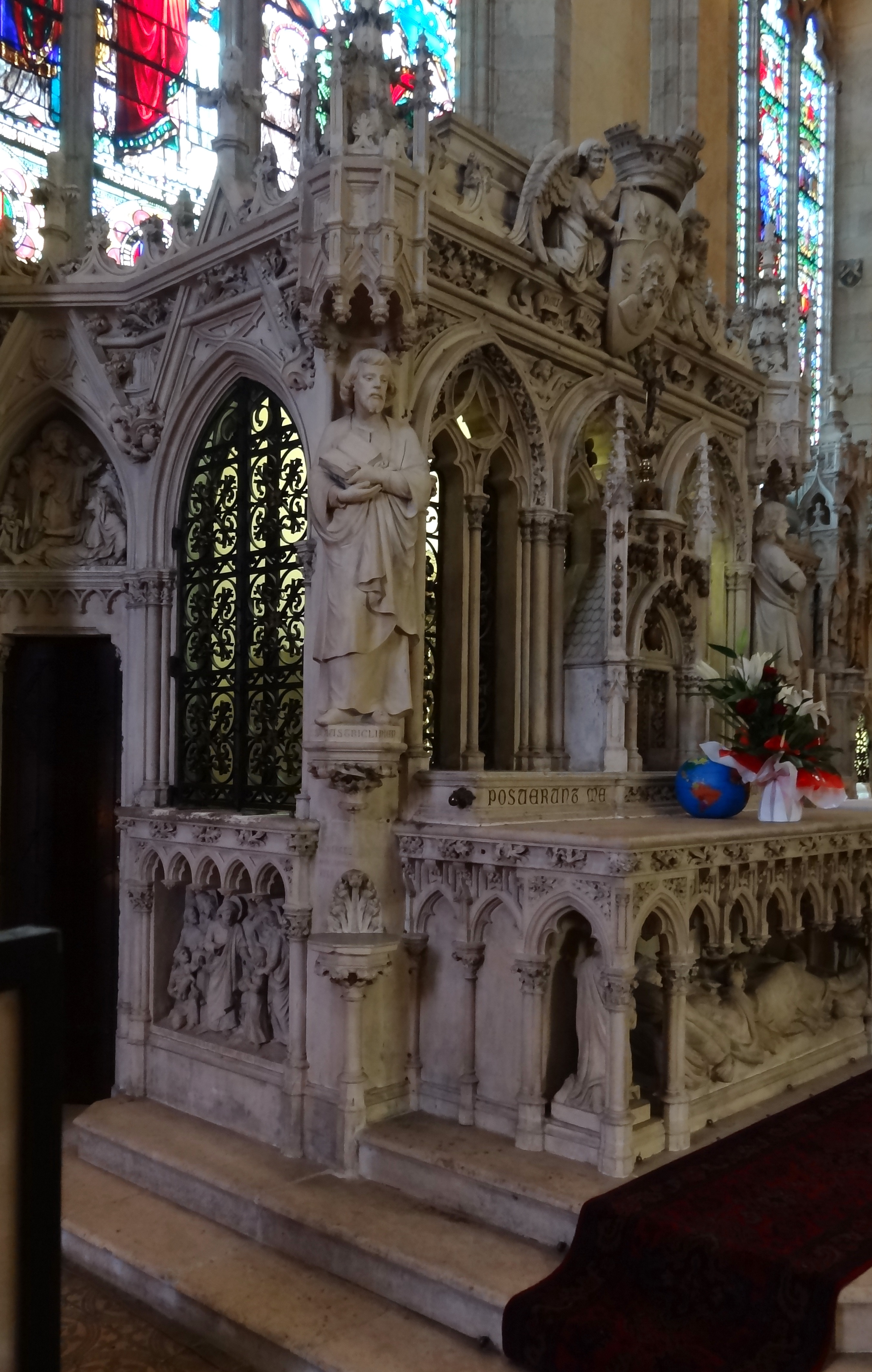 Église Saint-Michel-des-Lions - Martial de Limoges